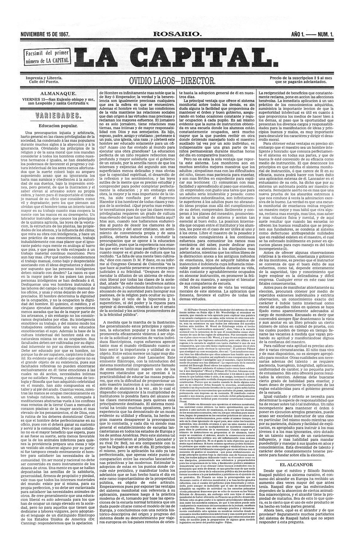 Es la tapa del 15 de noviembre de 1867 primer tapa en la historia del diario.